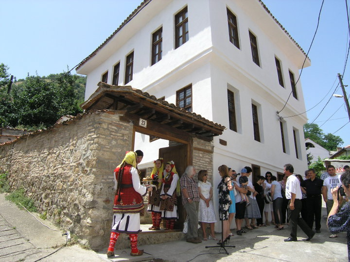 Старата турска пошта во Струмица